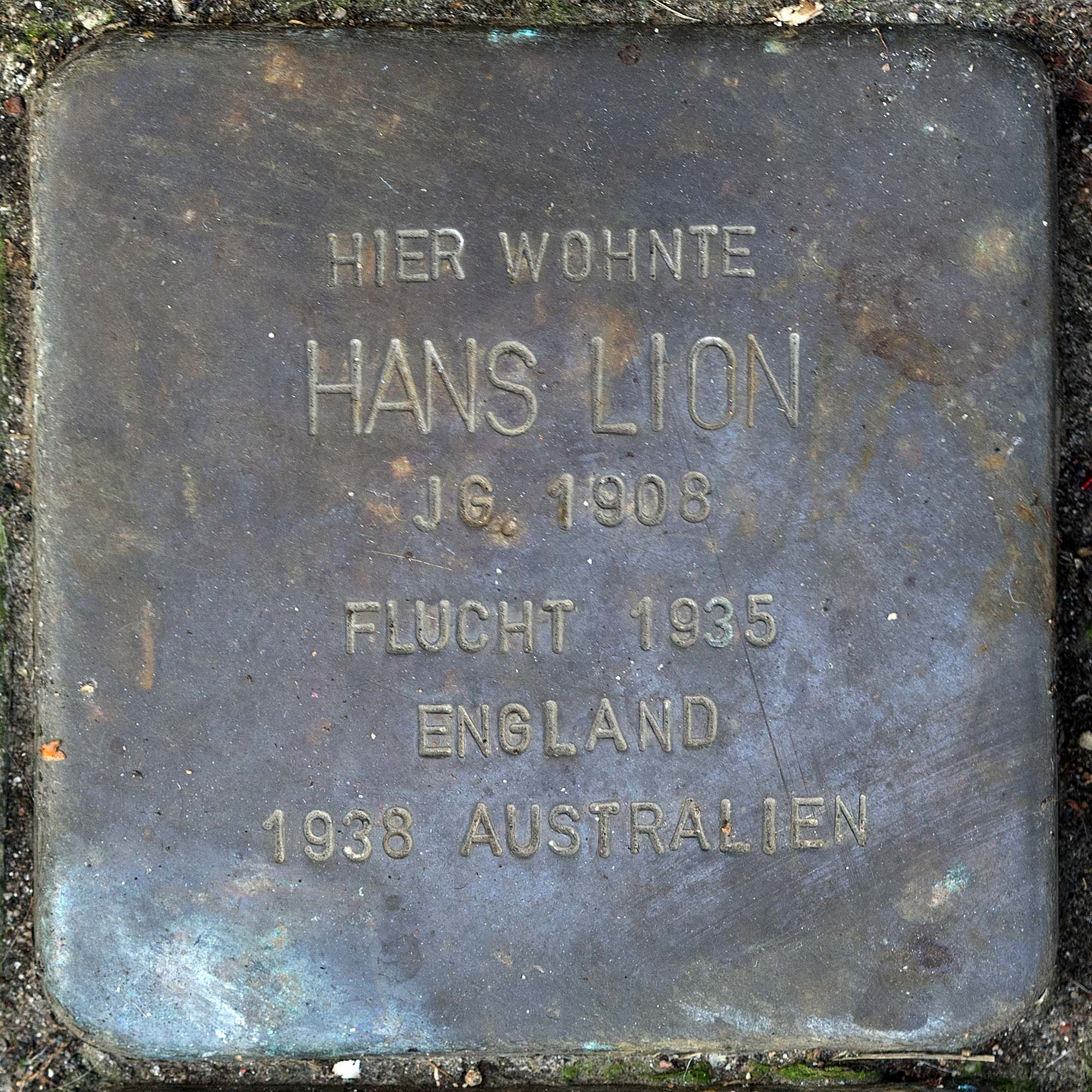 Stolperstein für Lion Hans